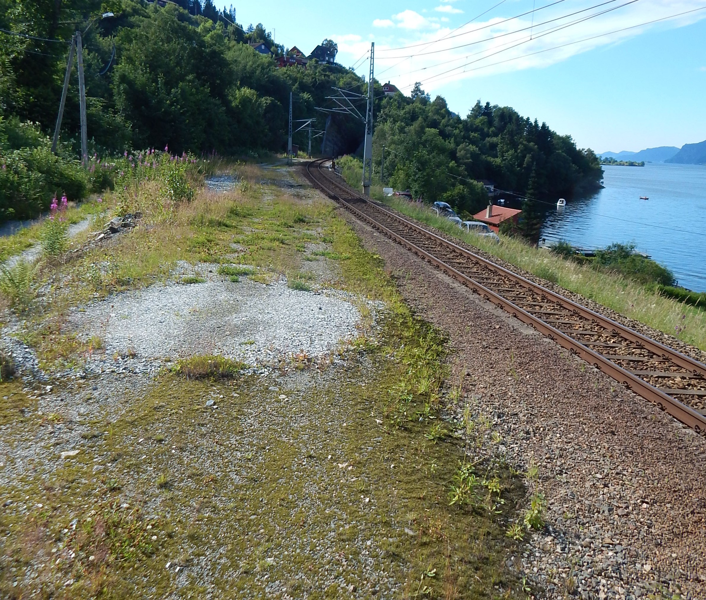 Takvam holdeplass på Bergensbanen i 2017